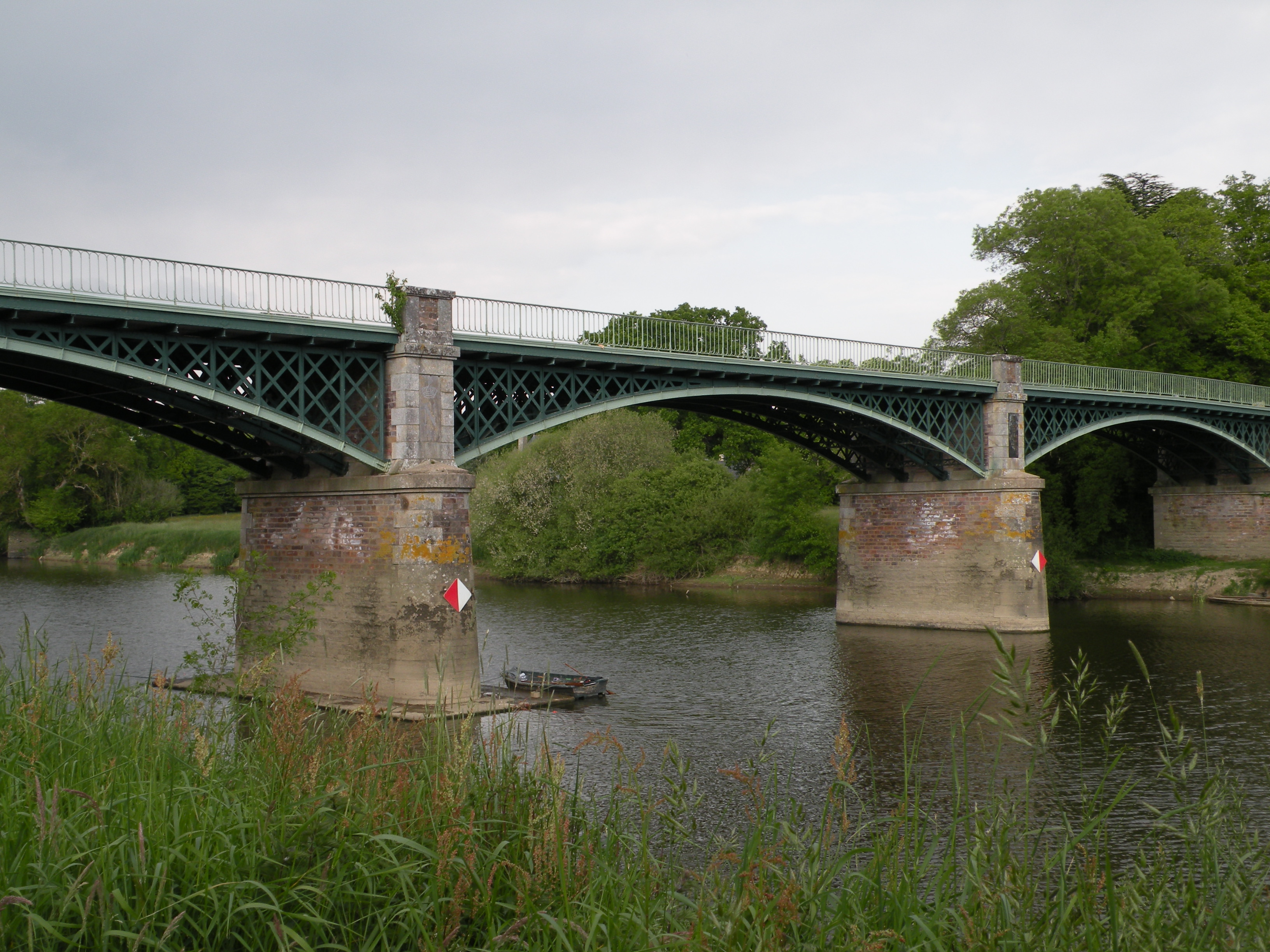 Pont de Port de Roche sur la Vilaine entre Langon et Sainte-Anne-sur-Vilaine.